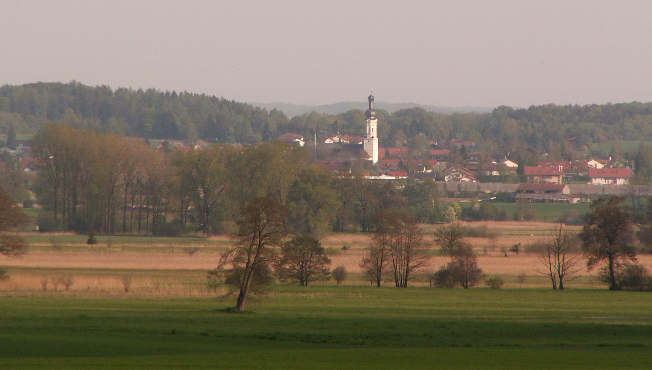 Inning am Ammersee mit Ampermoos